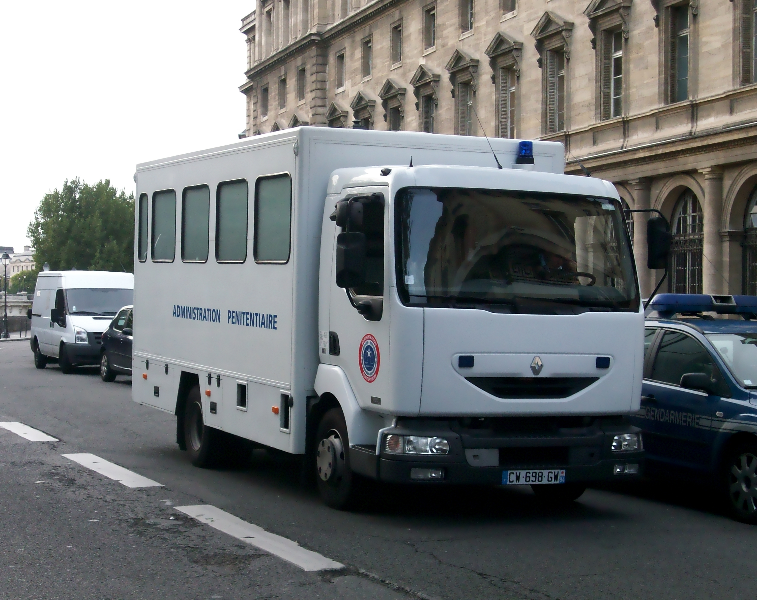 Camion de l'administration pénitentiaire à Paris